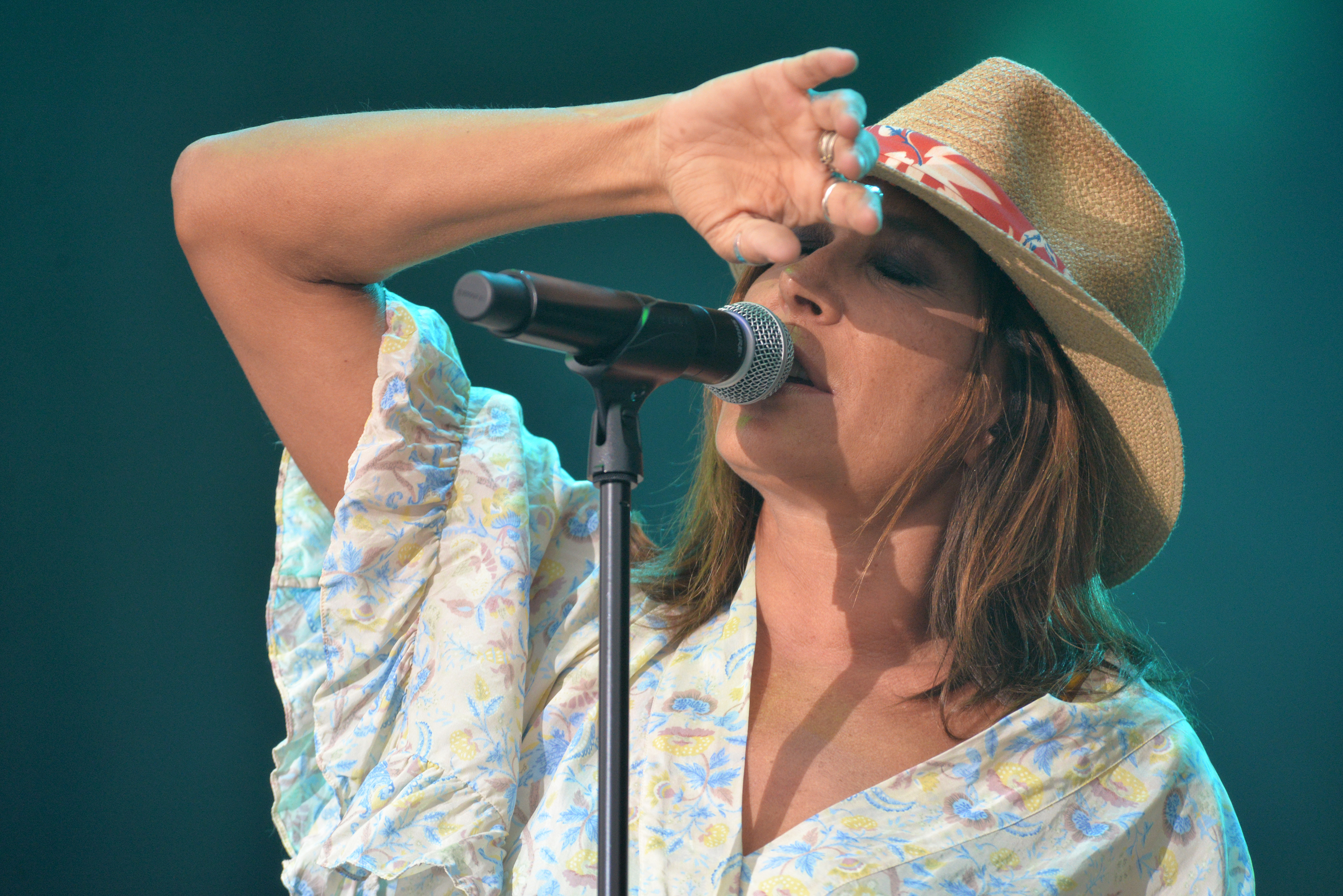 Concert de Zazie au festival Papillons de nuit 2019 à Saint-Laurent de Cuves, Manche, Normandie.